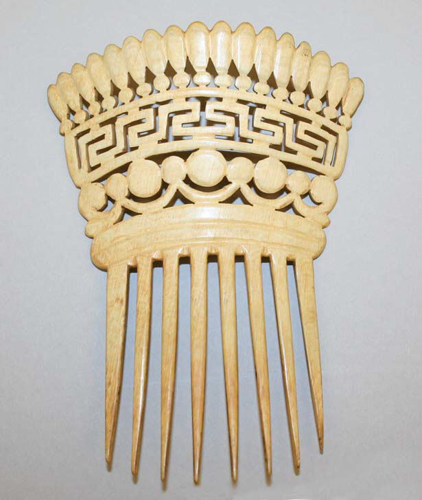 European; Comb